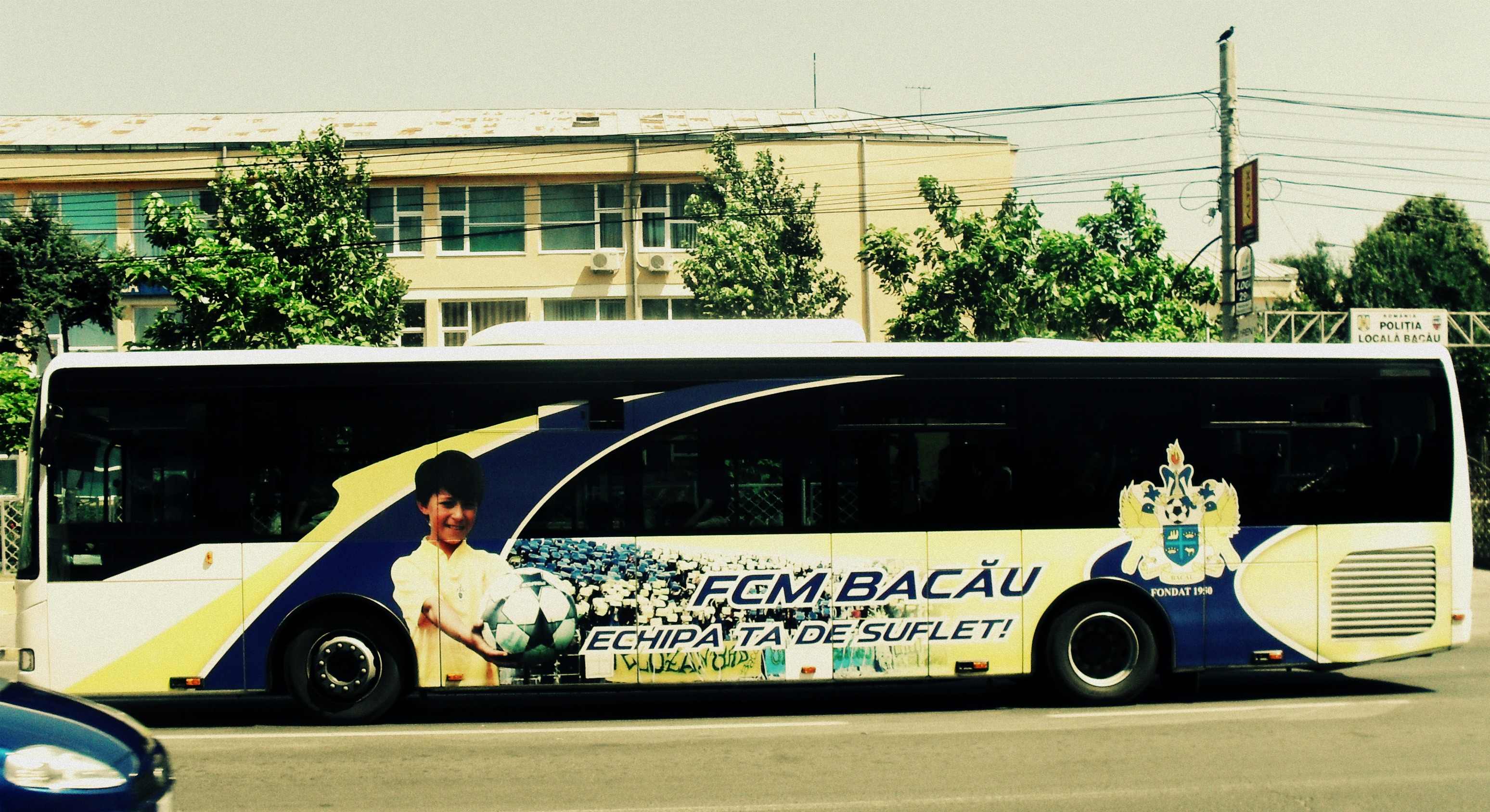 Transport Public Bacau cu emblema FCM Bacau